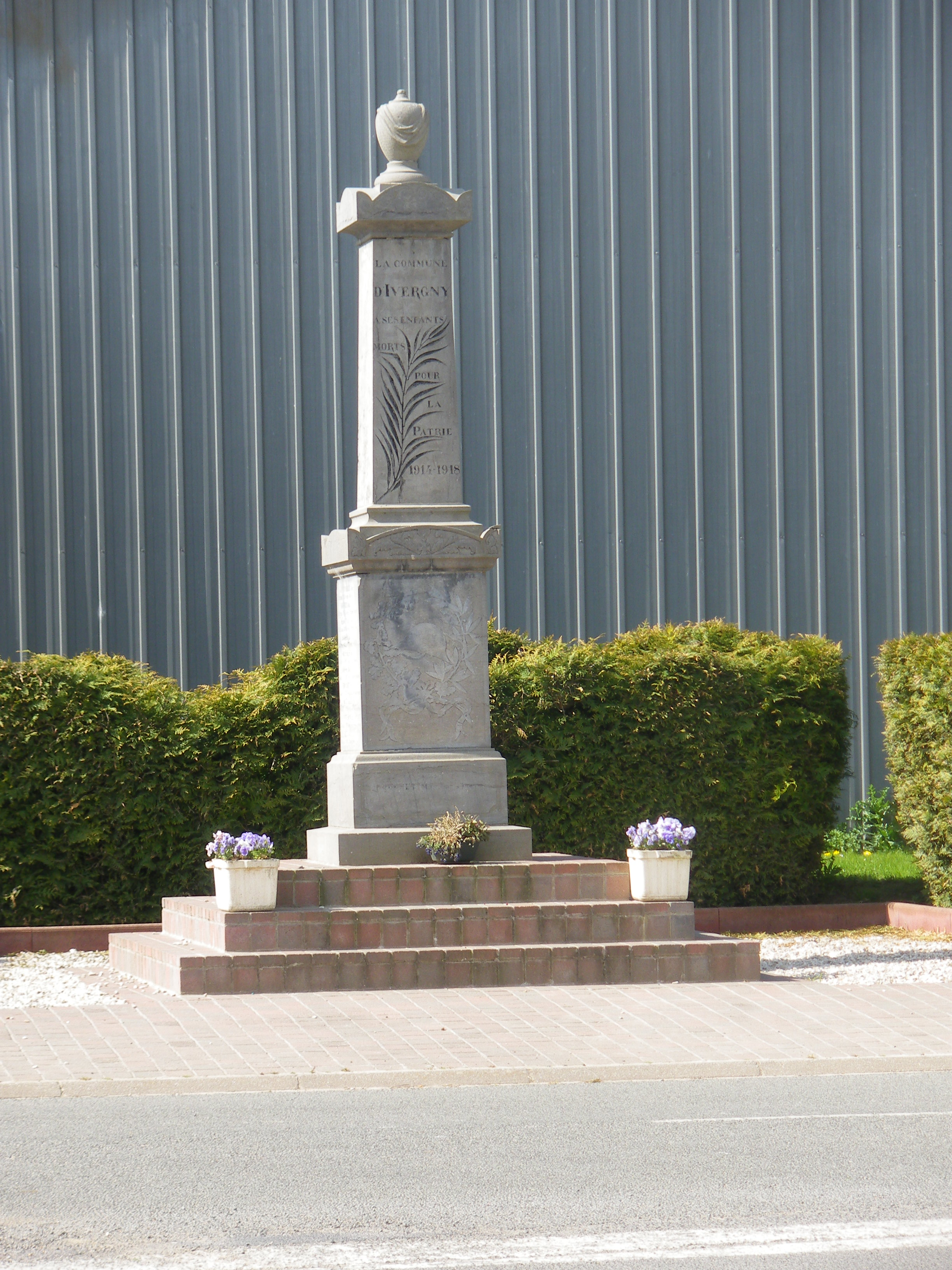 Vue du monument aux morts d'Ivergny.